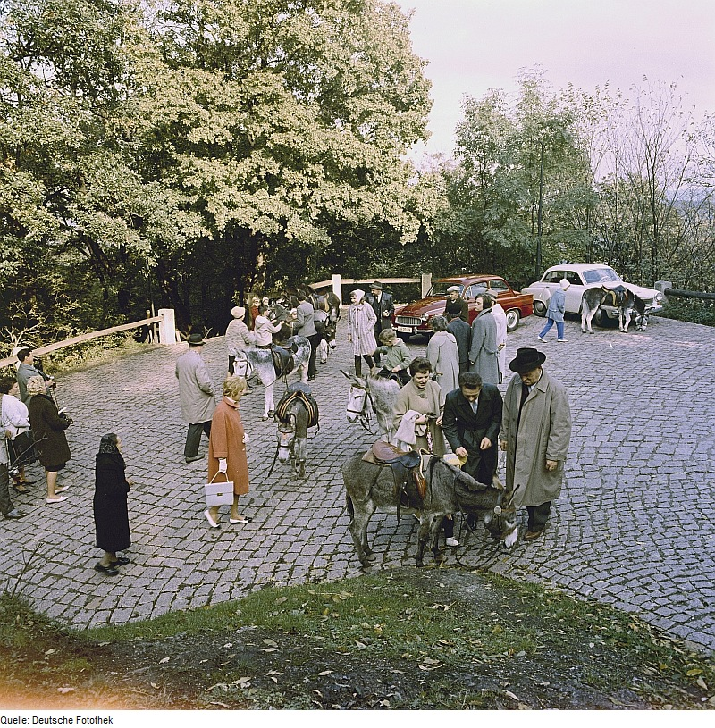 Original image description from the Deutsche Fotothek Eisenach. Eselreiten für Kinder zur Wartburg